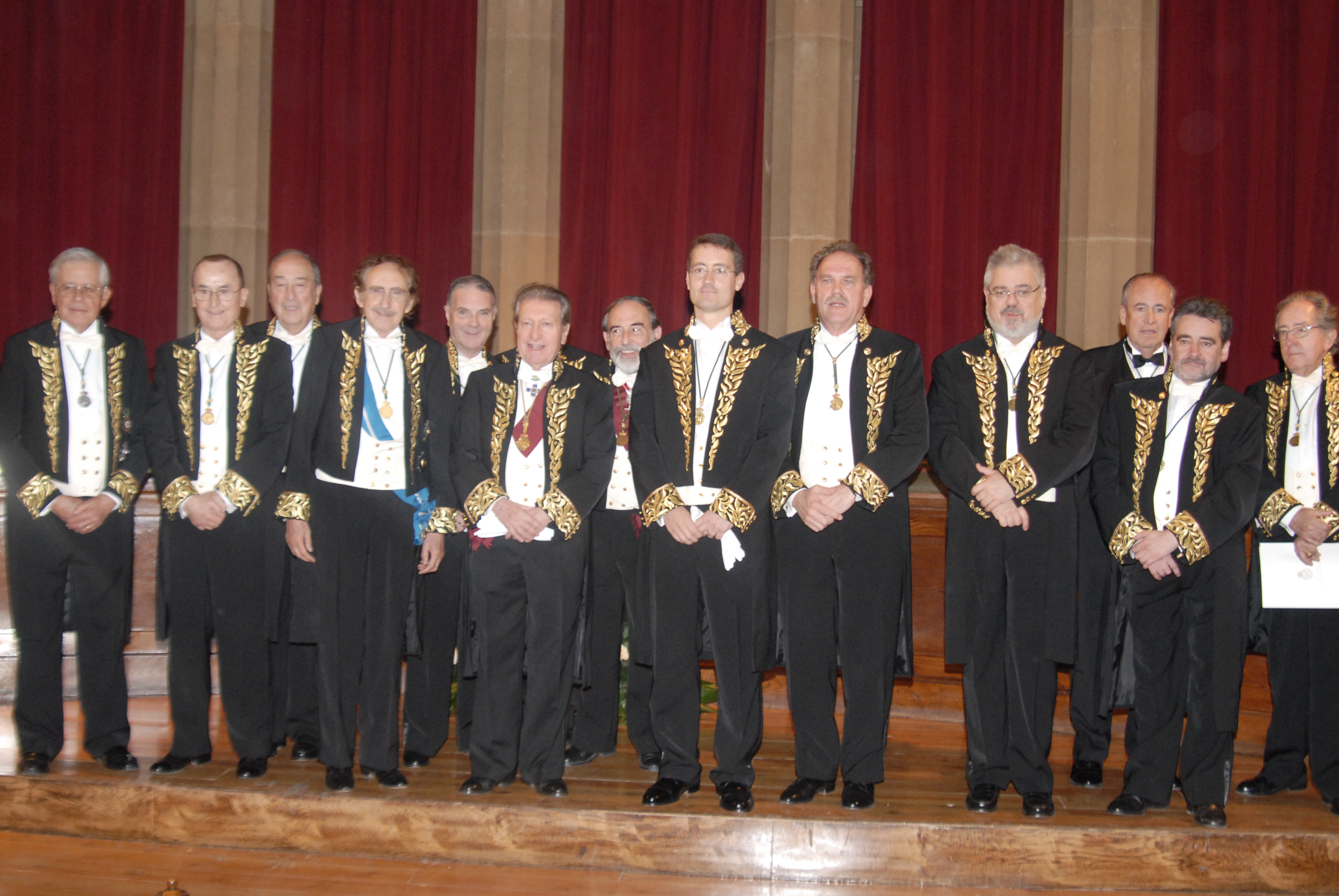 Ingreso del Dr. Barquero en la RACEF